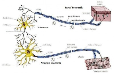 sel saraf sensorik dan sel saraf monotorik